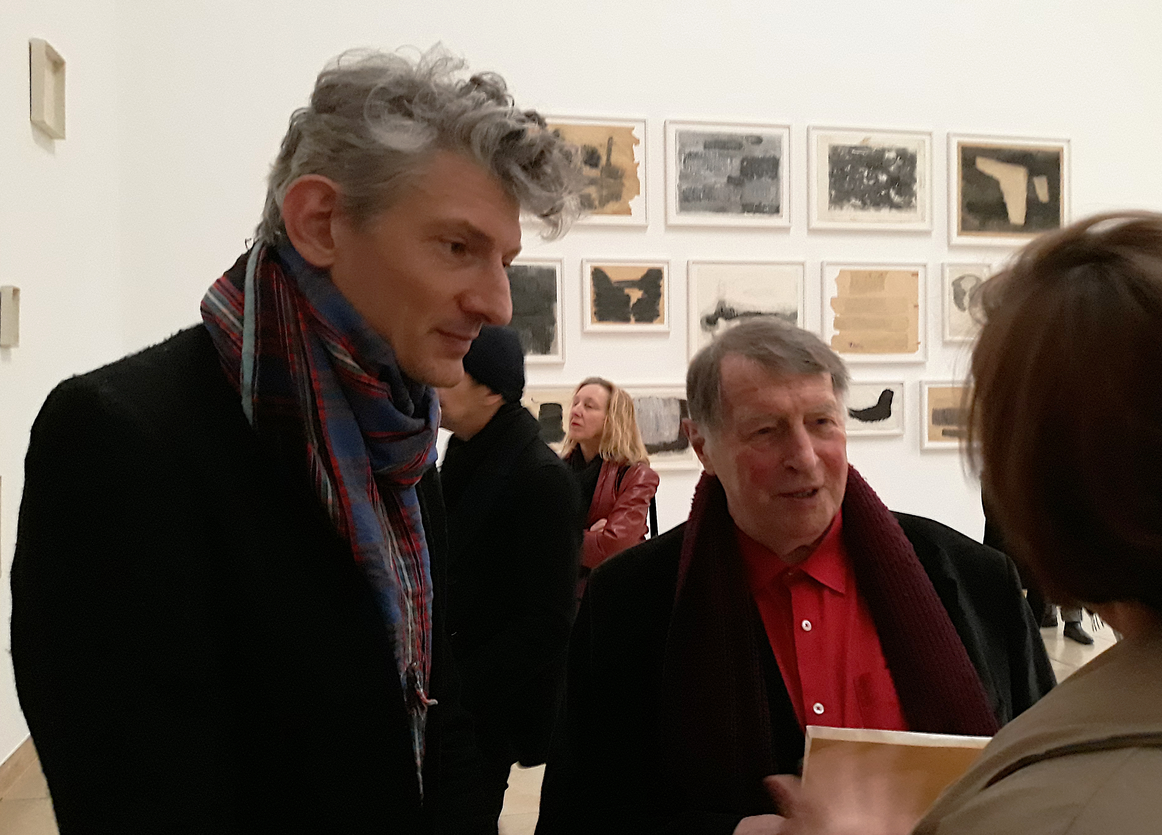 Andrea Lissoini und Franz E. Walther bei der Vernissage der Walther-Retrospektive im Haus der Kunst, München am 5. März 2019